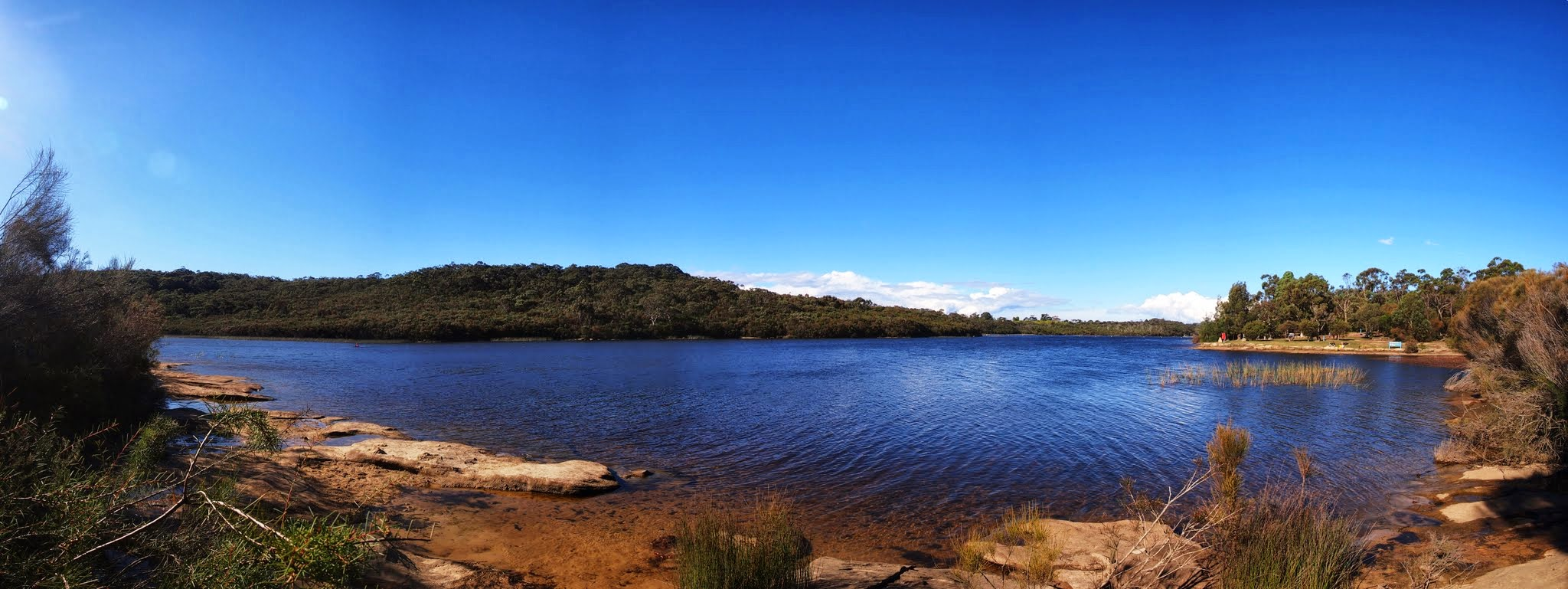 Manly Dam